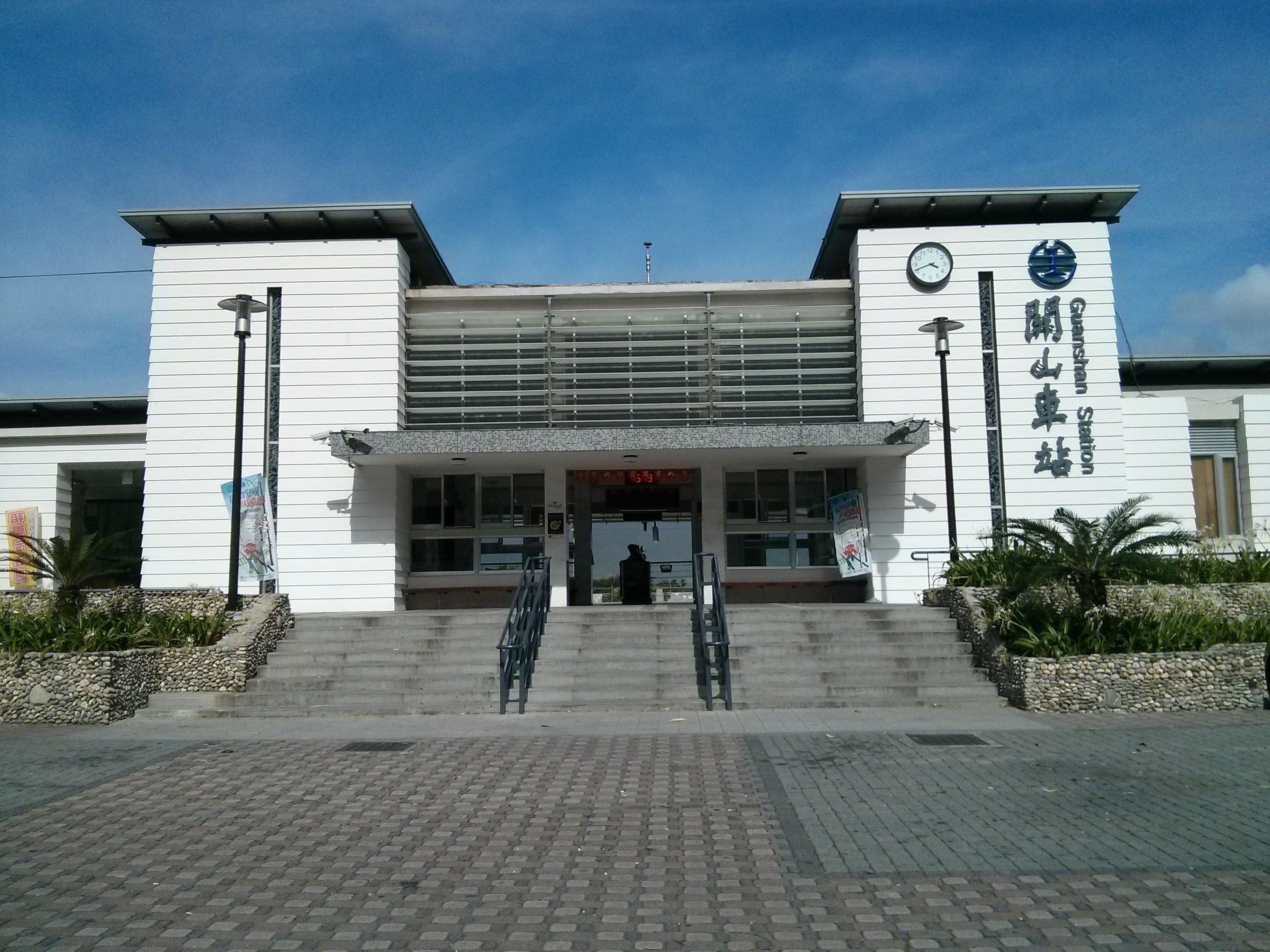 2014年6月的臺灣鐵路管理局關山車站